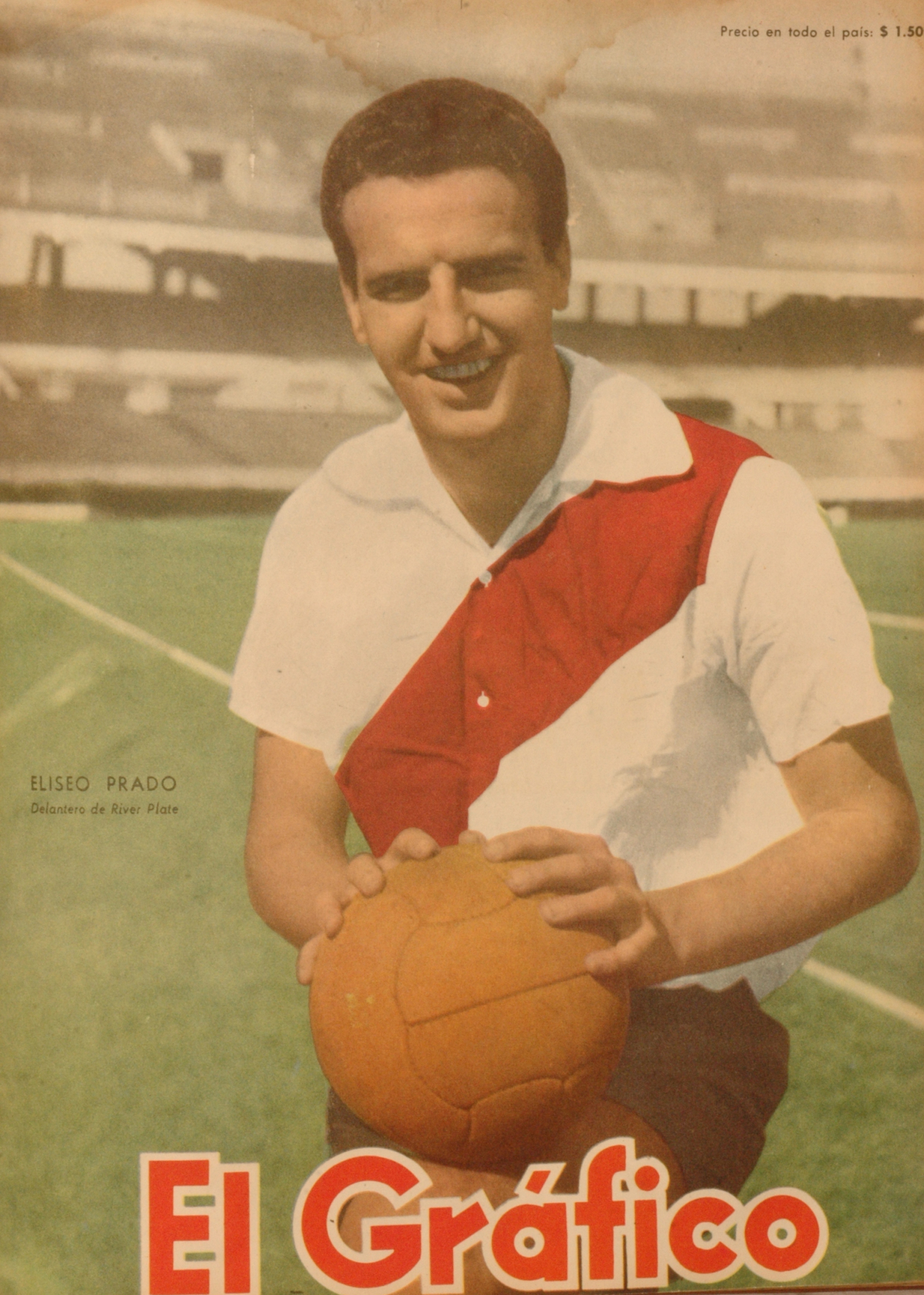 El Grafico del 01 de Mayo de 1953. Edicion 1760